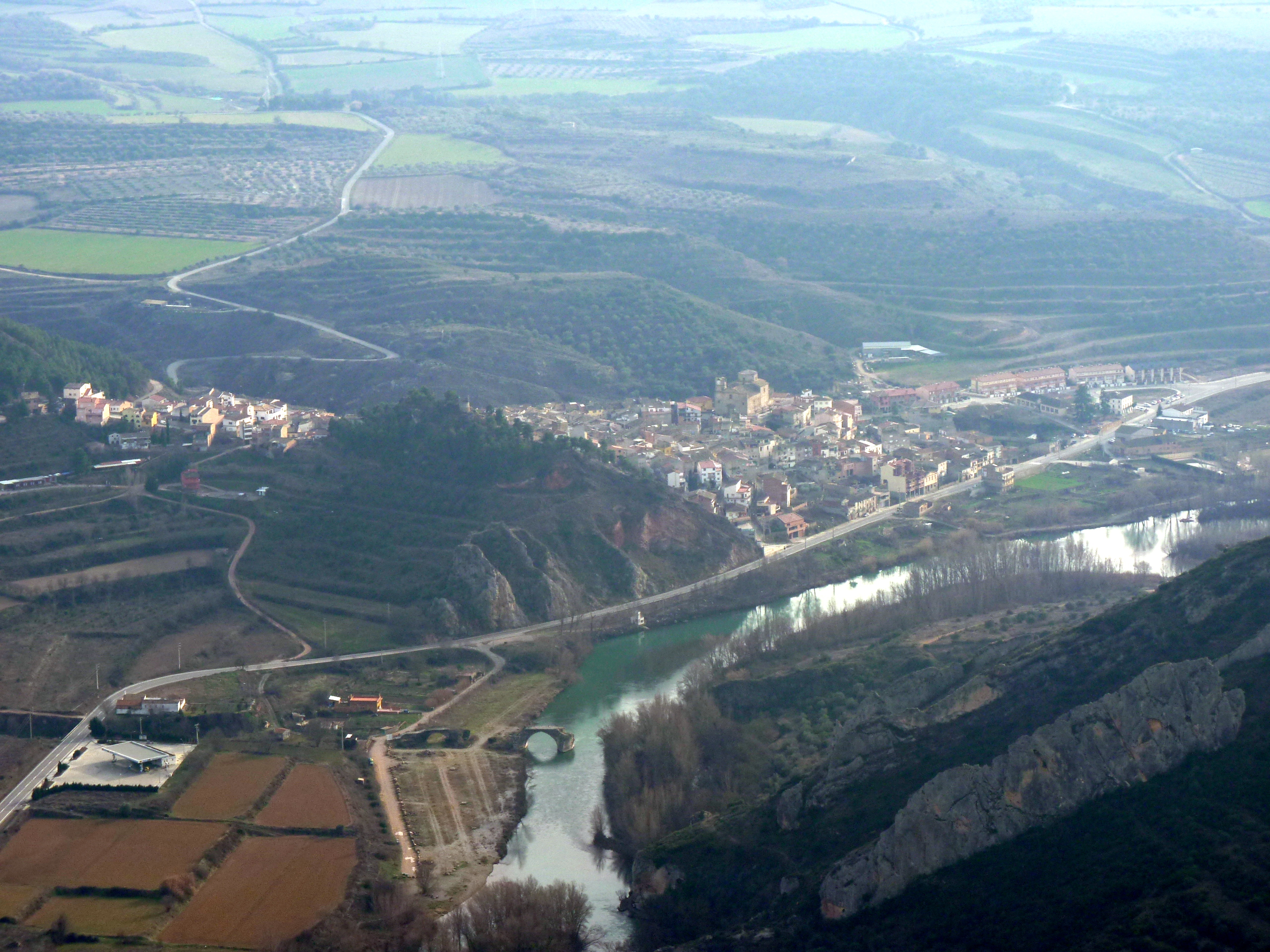 Vista de Camarasa